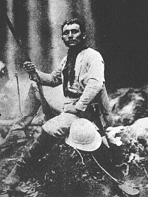 Marechal Cândido Mariano da Silva Rondon: quando Jovem, desbravando os ignotos sertões da Amazônia brasileira. Hoje, Patrono da Arma de Comunicações do Exército Brasileiro.